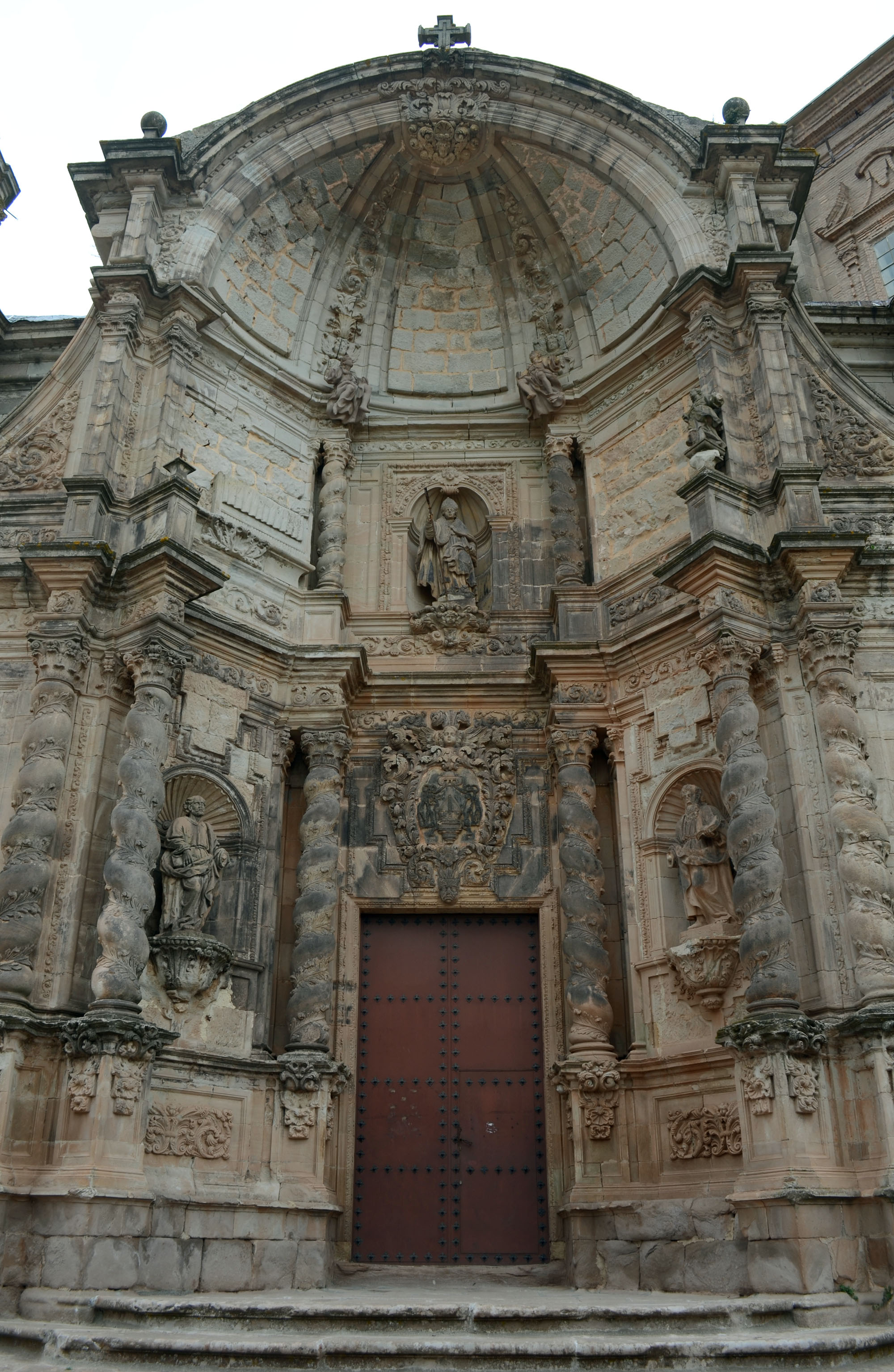 Puerta sur de la Basílica de San Gregorio Ostiense, de estilo barroco (Sorlada, Navarra, España)